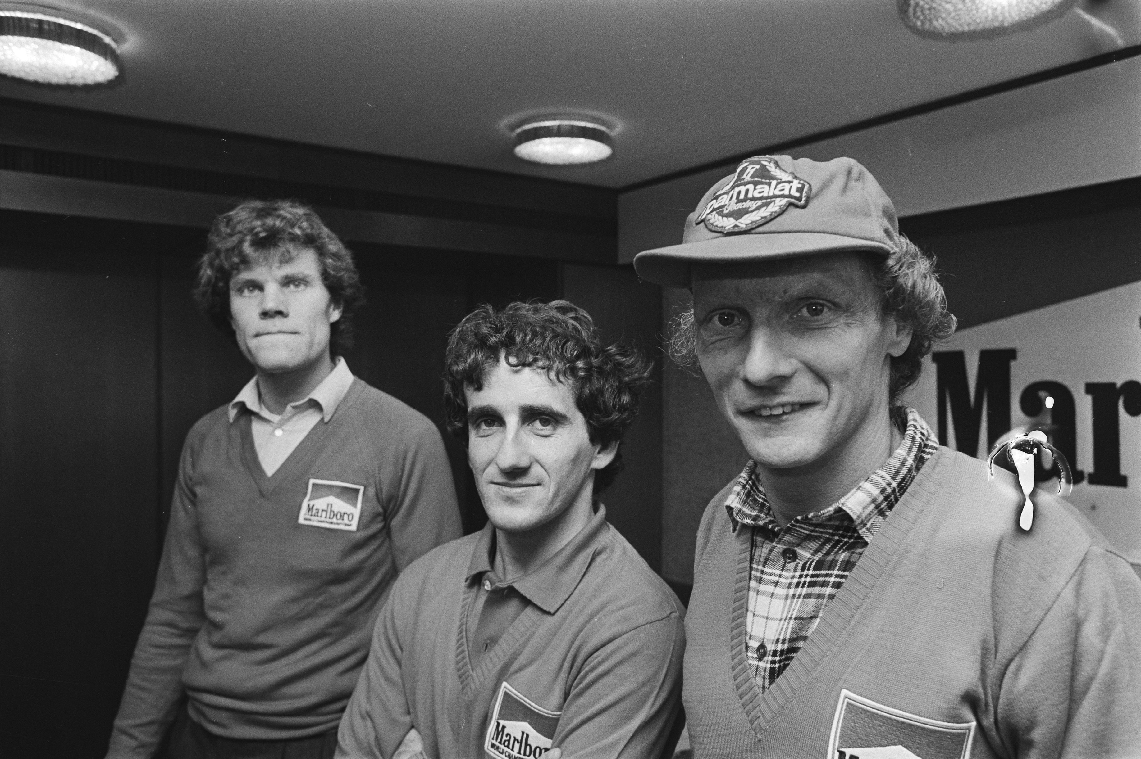 Persconferentie autocoureurs Lauda en Prost op Schiphol in behalen van resp. 1e en 2e plaats in WK Formule 1 door het Marlboro/Mclarenteam